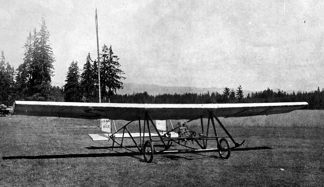 Szybowiec SL-1 Akar na lotnisku, 1923 r.